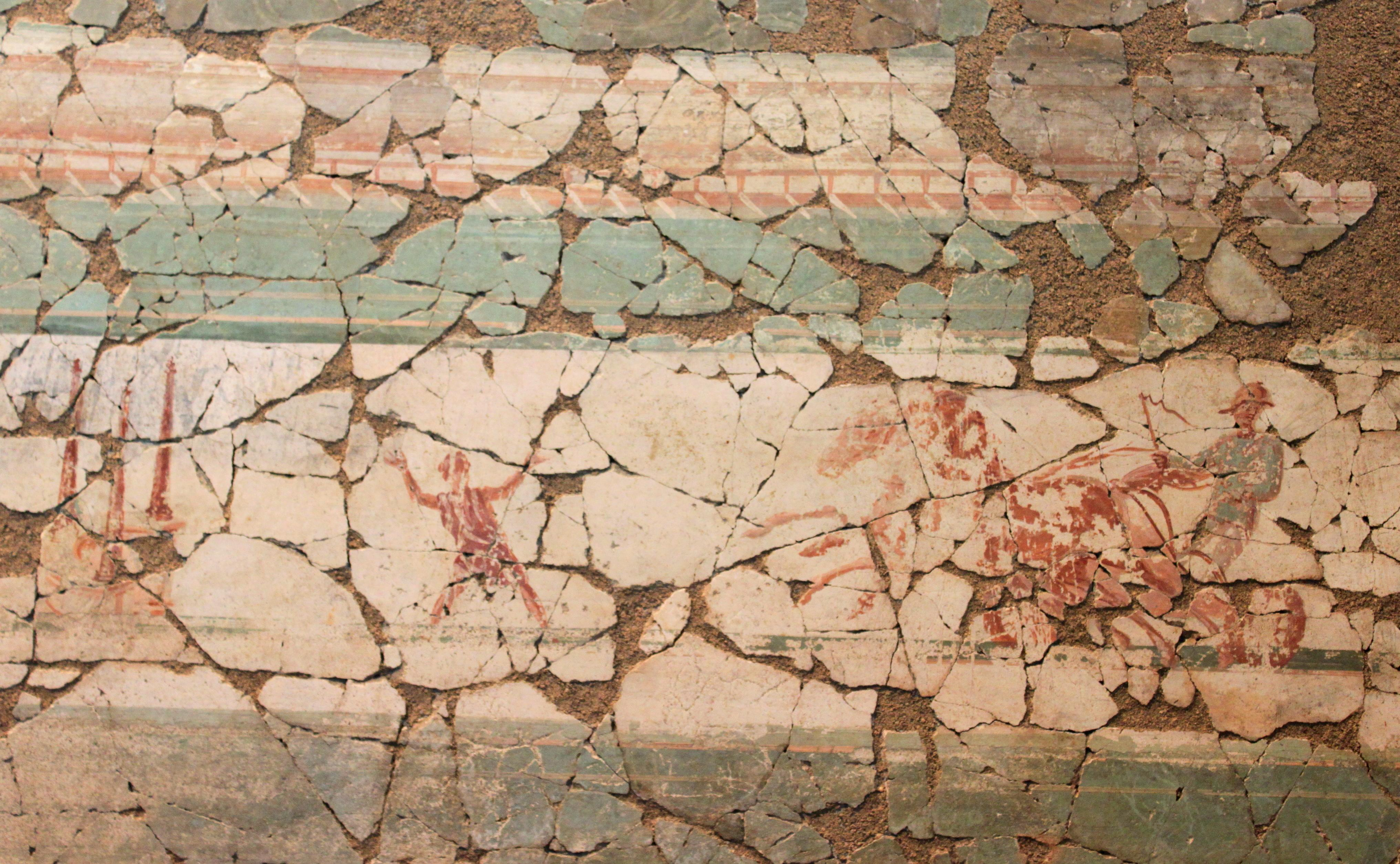 Suisse, canton de Vaud, Pully, villa romaine du Prieuré, peintures murales, l'aurige et le garçon de piste.